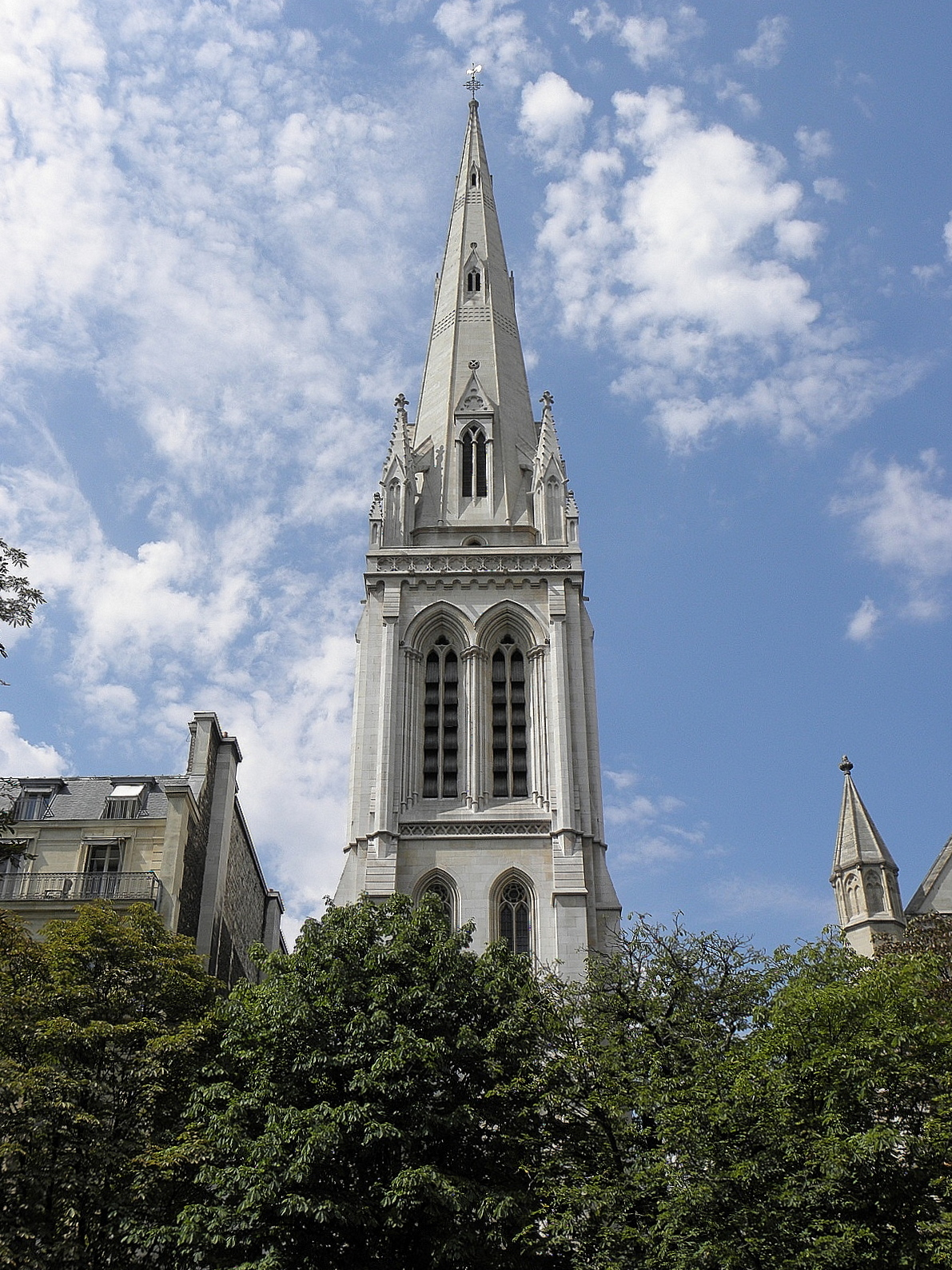 Tour-clocher de la cathédrale américaine de Paris (75).